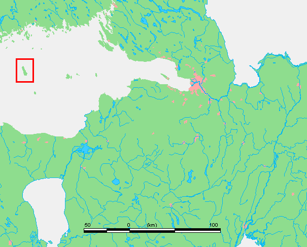 Hogland